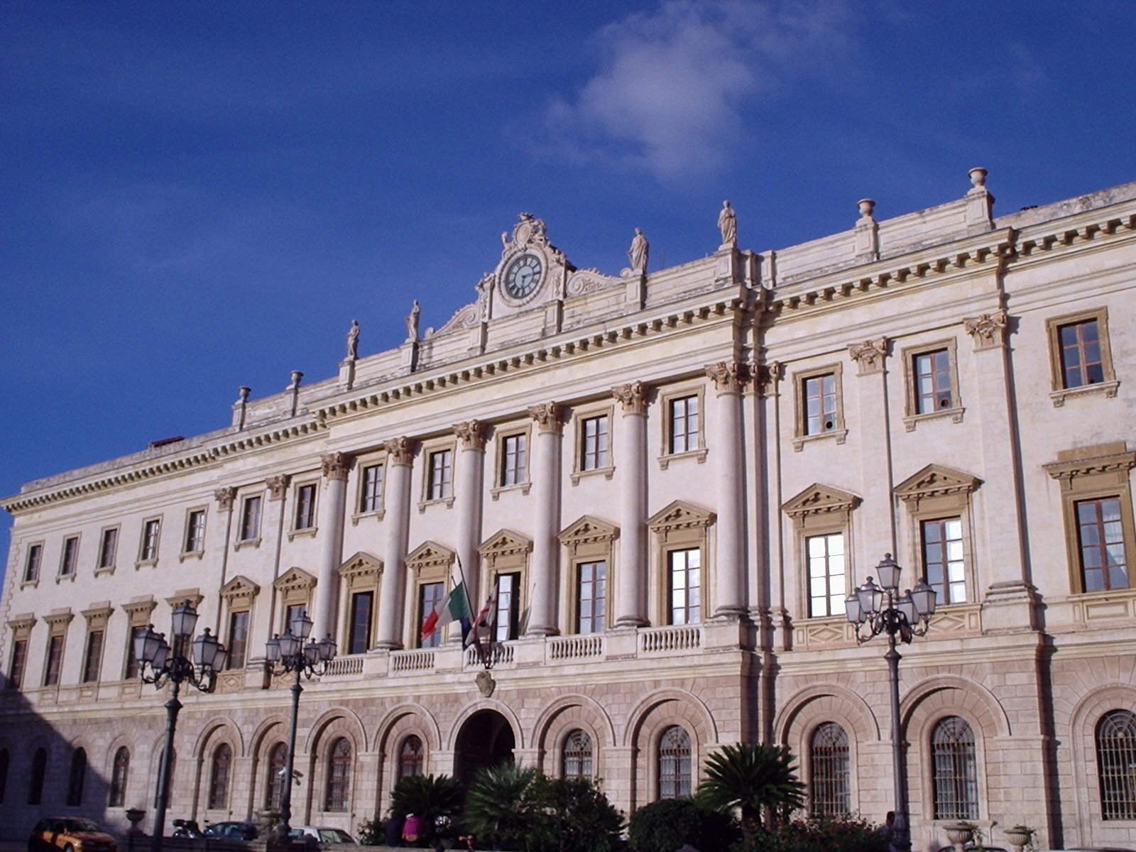 piazza d'Italia a Sassari